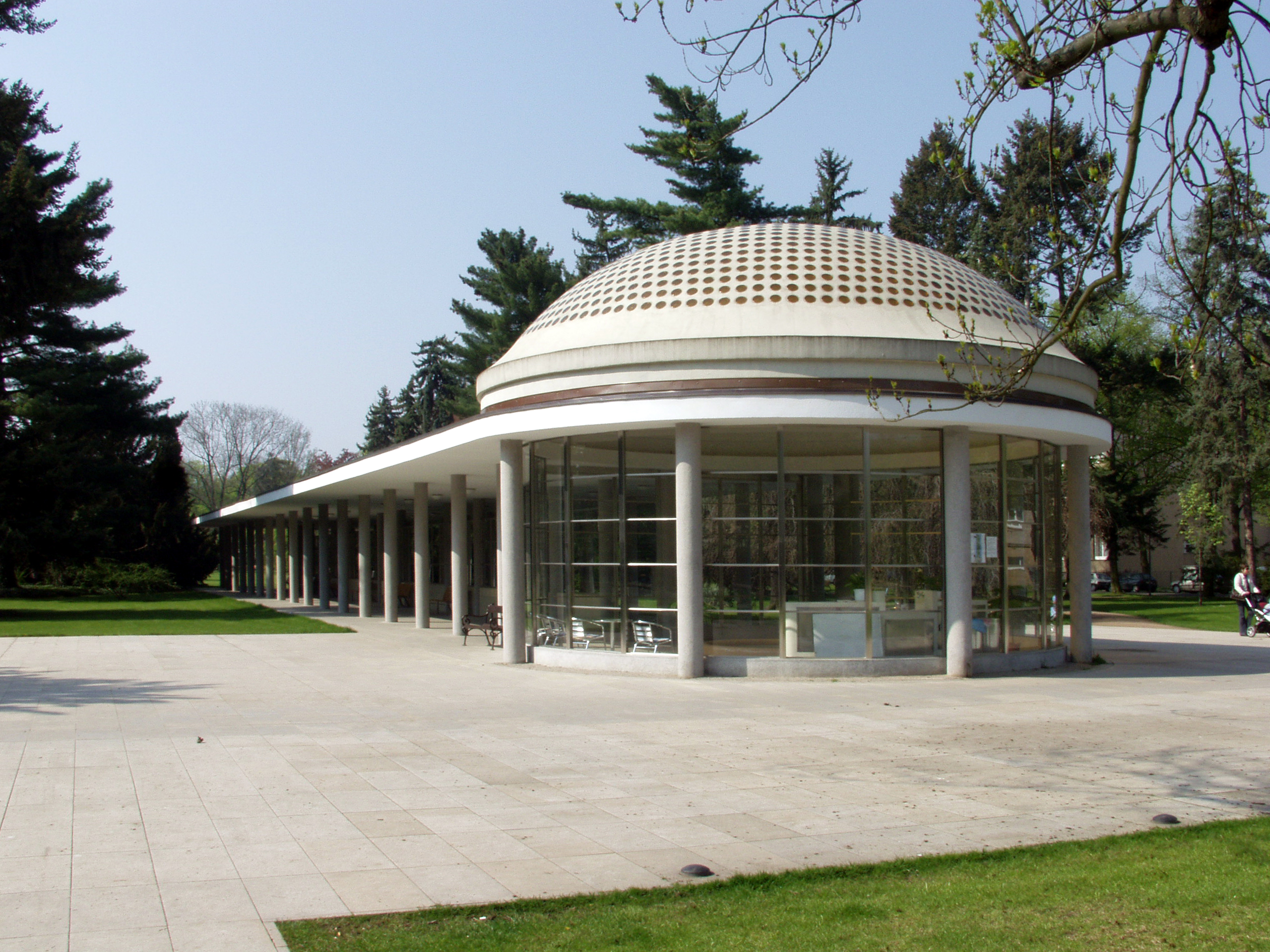 Poděbrady - Libenského kolonáda (arch. Vojtěch Kerhart, r. 1936)